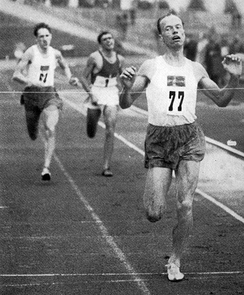 Dan Waern